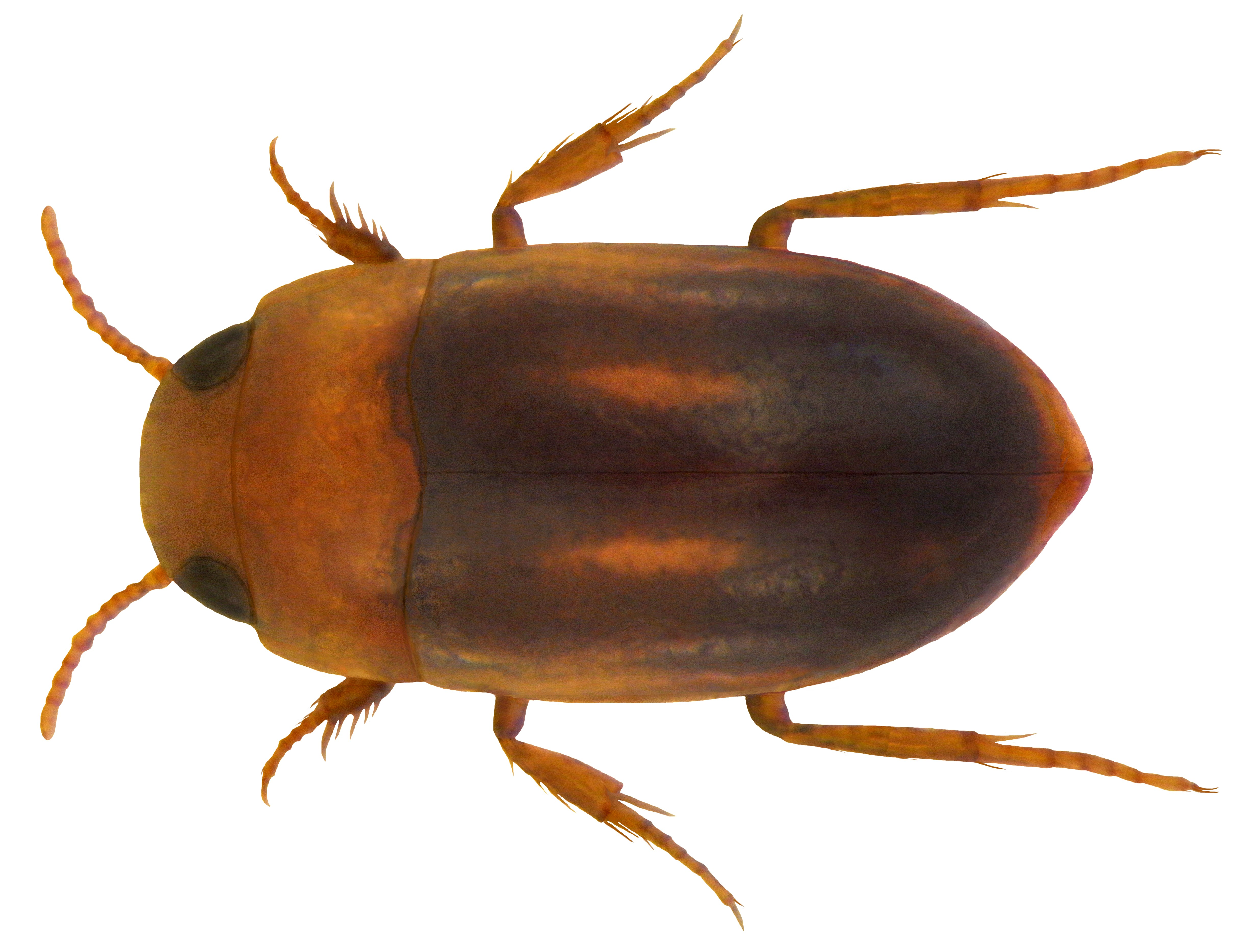 Neohydrocoptus subvittulus (Motschulsky, 1859) Familie: Noteridae Groesse: 2,0 mm Fundort: Indien, Süd-Goa, Canacona, Raj Baga Beach leg. U.Schmidt, 2010; det. A.Skale, 2010 Photo: U.Schmidt, 2011